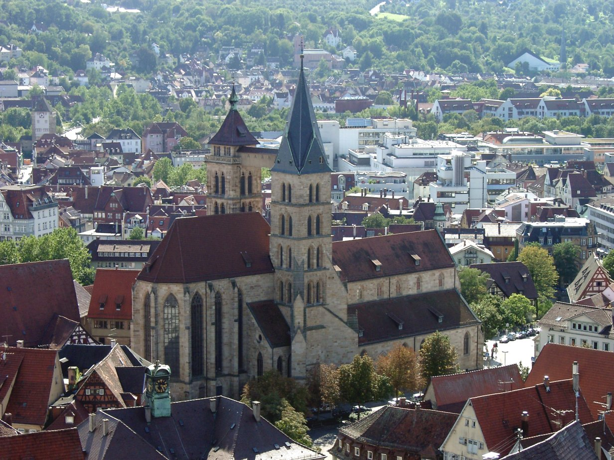 Blick über die evangelische Stadtkirche St. Dionys in Esslingen von Norden aus.